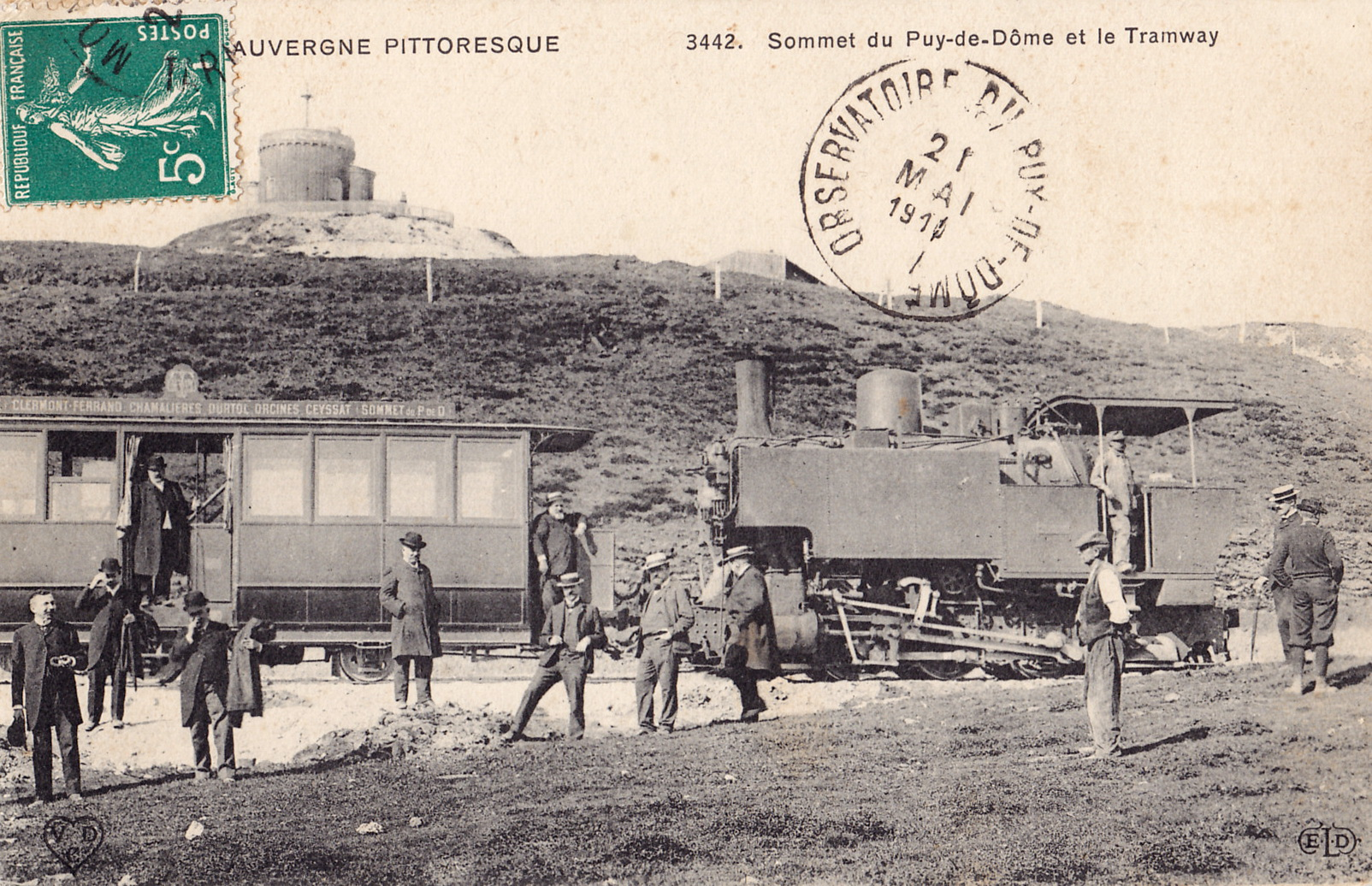 Carte postale ancienne éditée par VD et cie, et ELD, n°3442 : Sommet du Puy-de-Dome et le Tramway